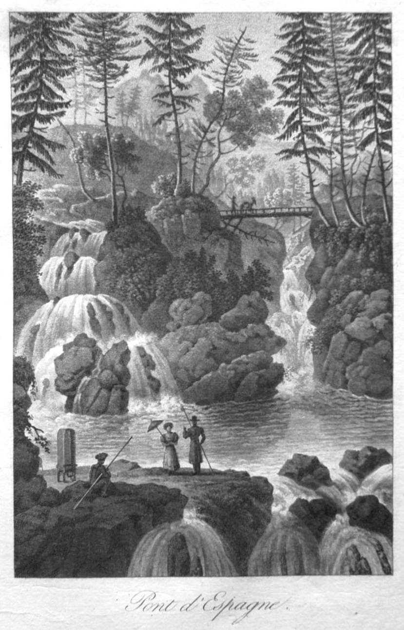 Gravure représentant la cascade du Pont d'Espagne, Cauterets, France - AM Perrot, 1834